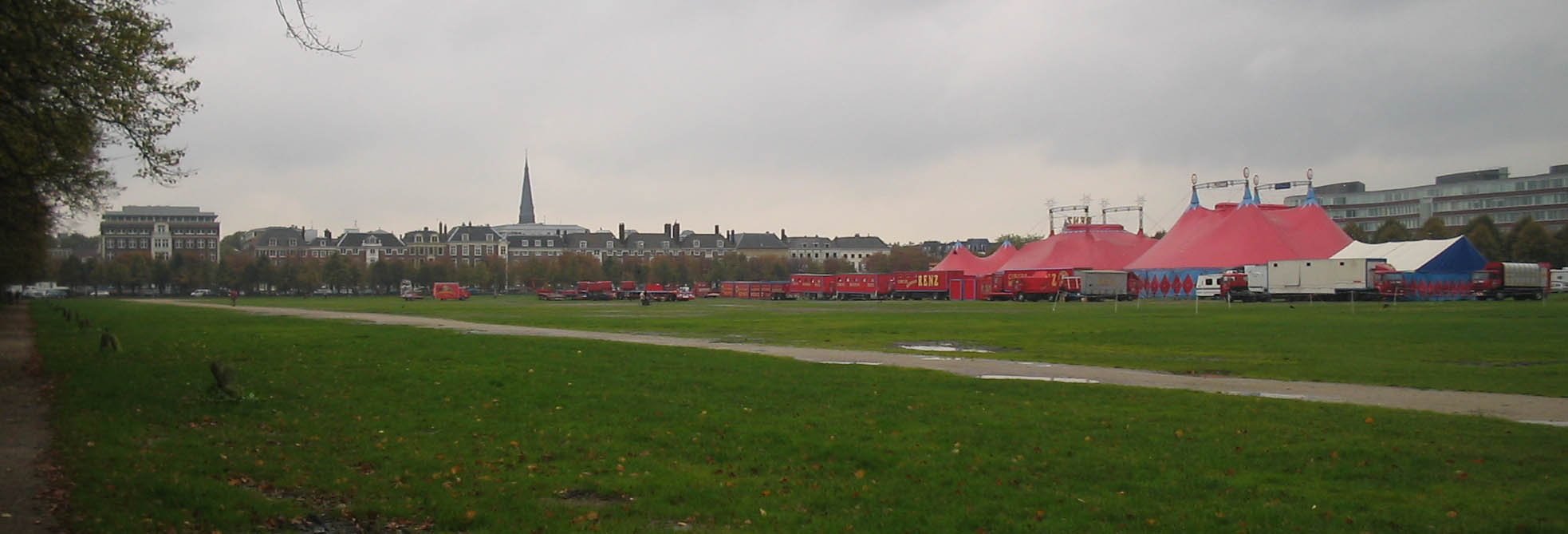 Malieveld met circus, Den Haag, Netherlands, 21 oktober 2005